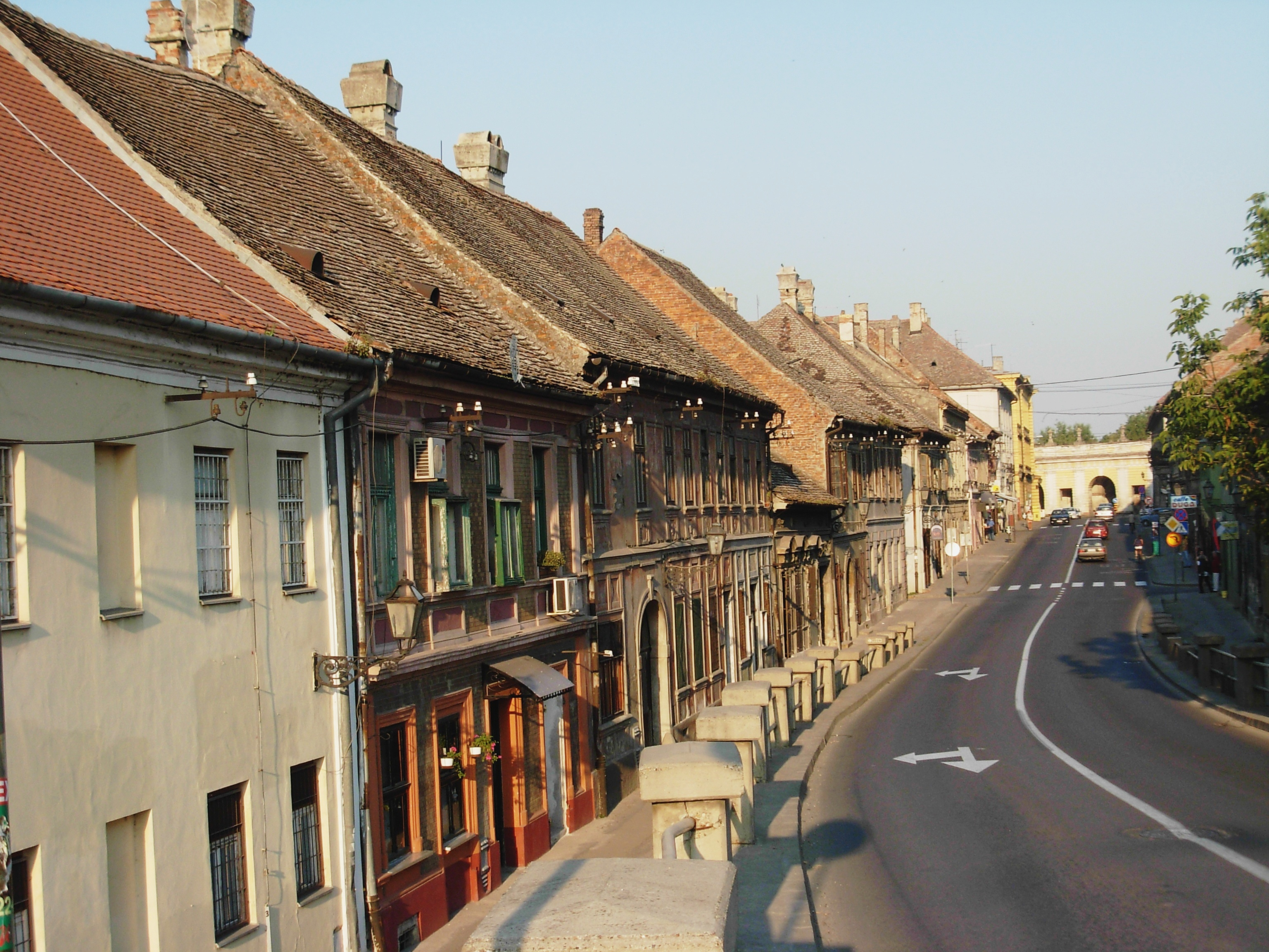 Podgrađe Petrovaradinske tvrđave. Pogled sa Varadinskog mosta.